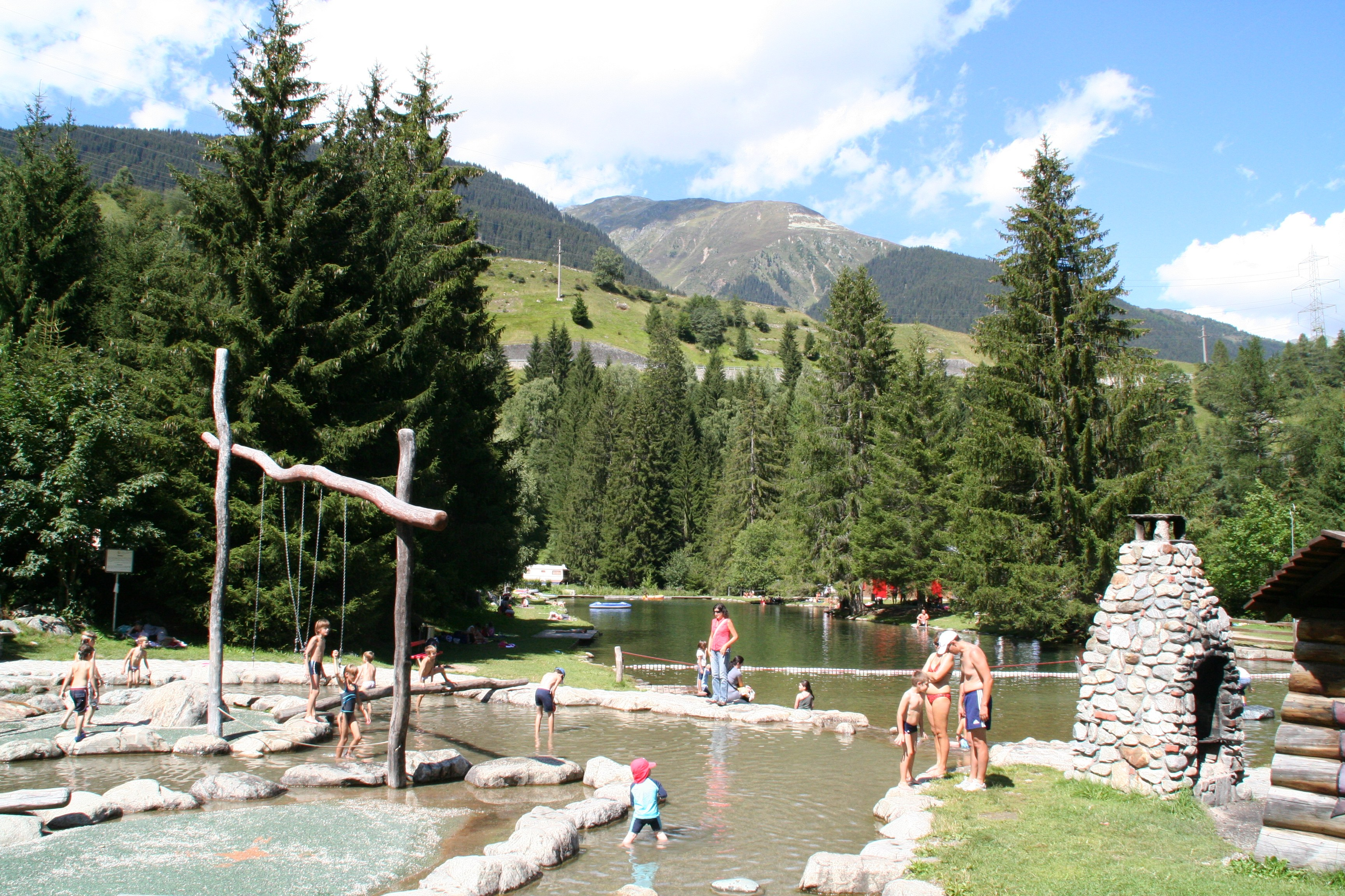 Badesee beim Campingplatz Fontanivas